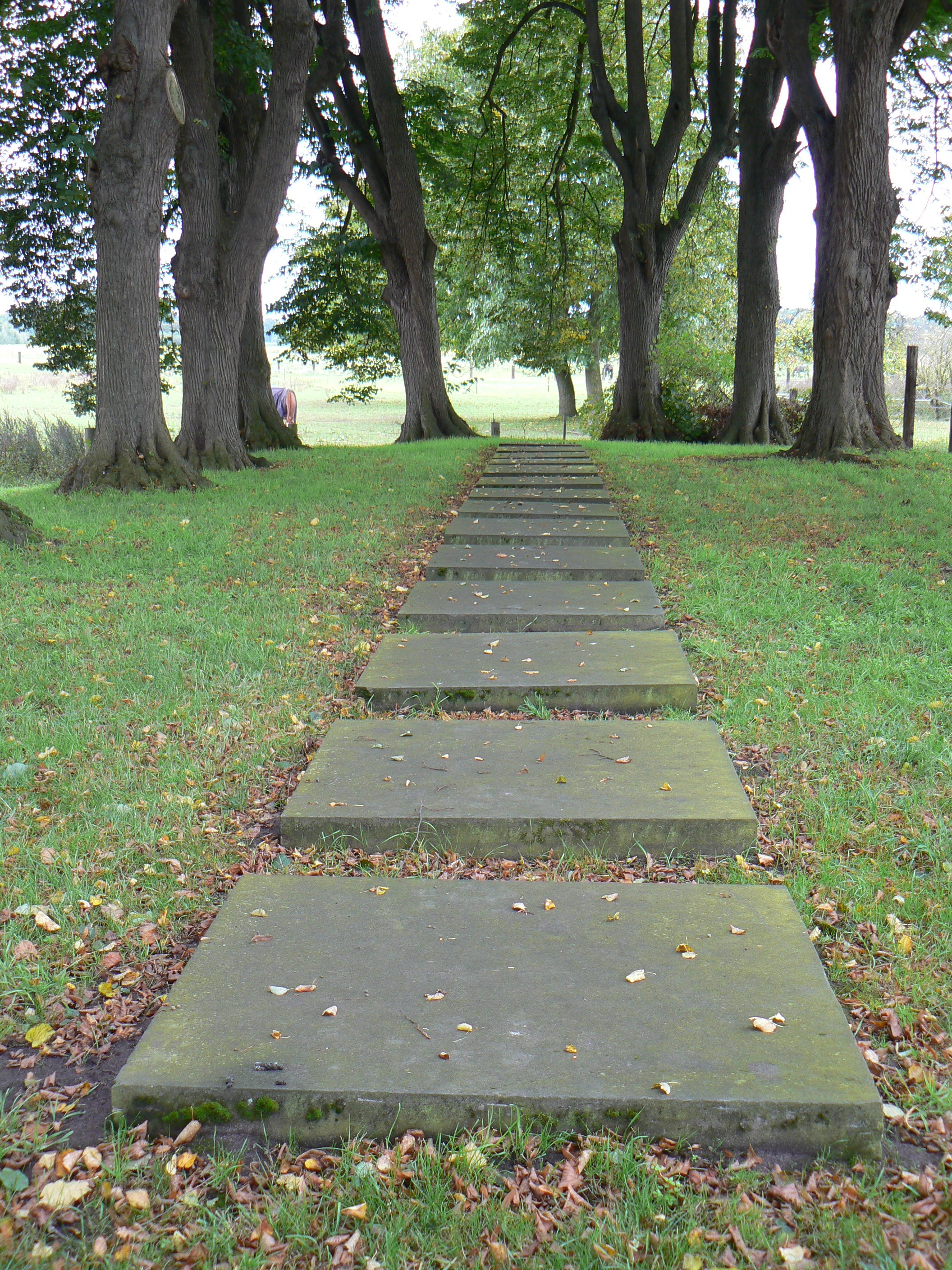 sculpture Kreuzweg (1979) by Karl Prantl in Frenswegen/Germany